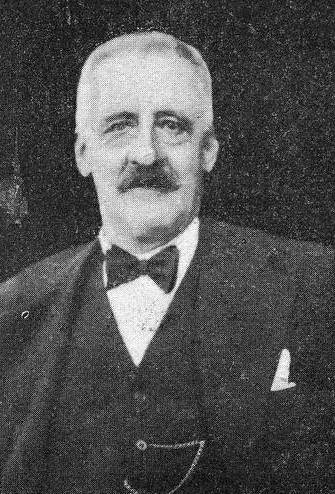 Estanislao Pérez Artime, fotografía en Vida Gallega 1936